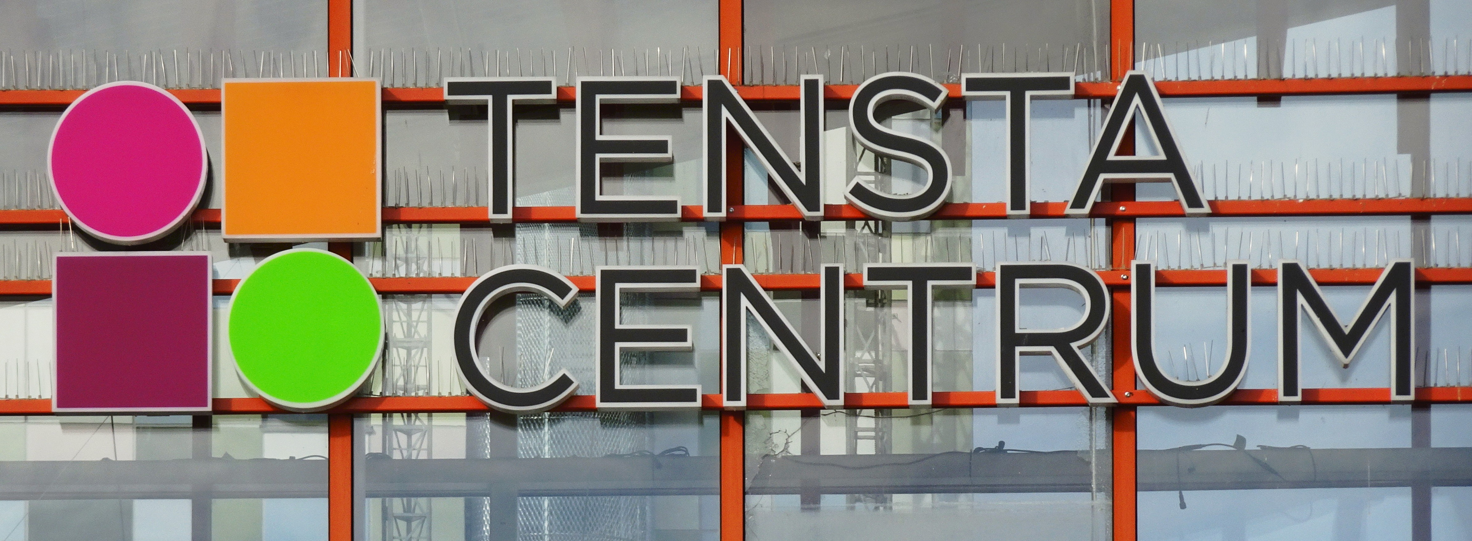 Tensta centrum skylt